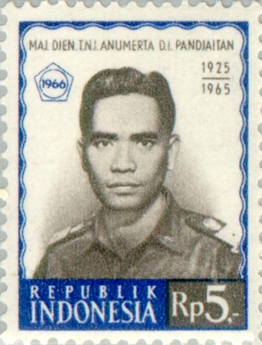 Donald Izacus Pandjaitan